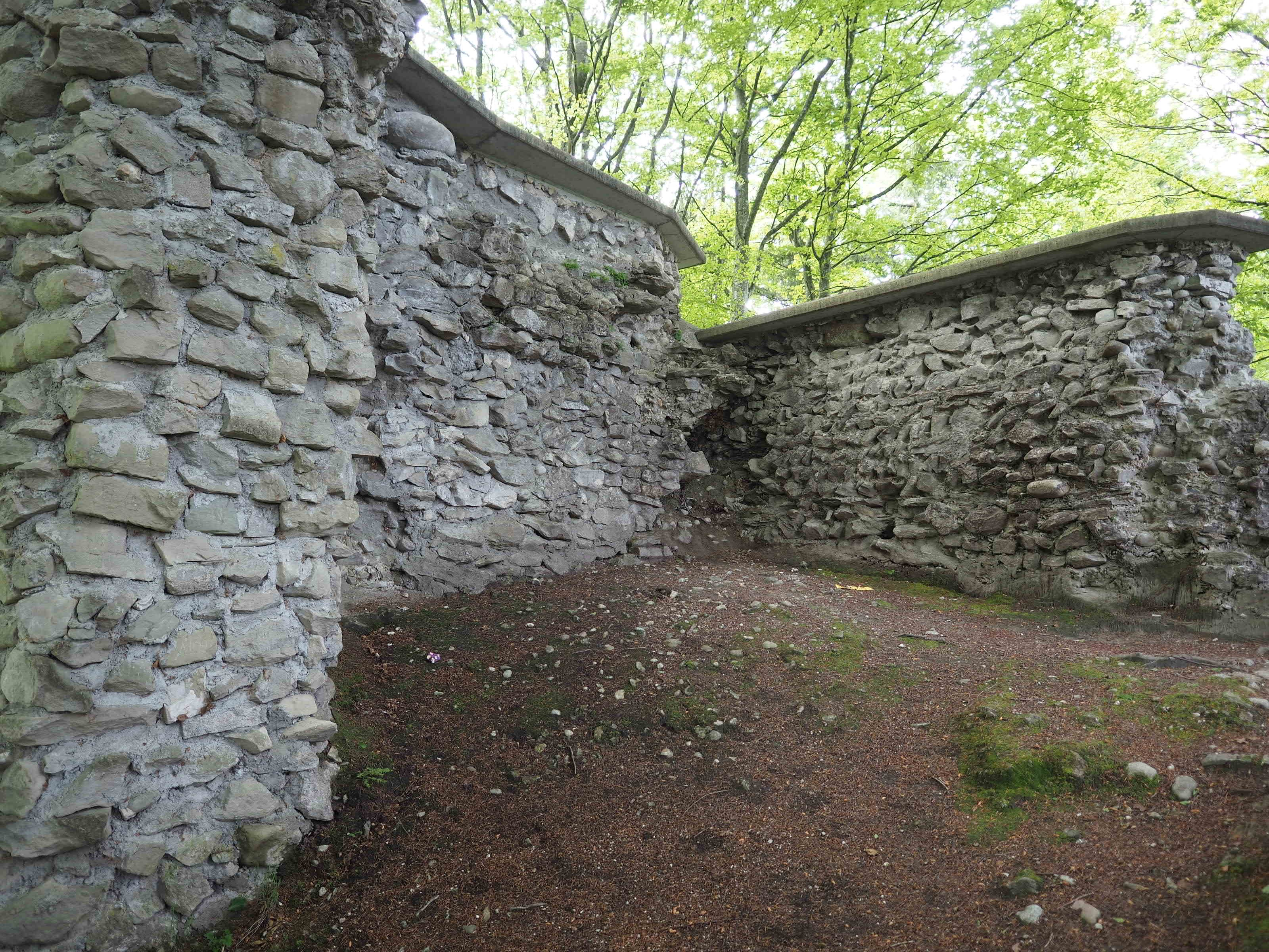 Ruine Wartenstein - Turmruine Innenaufnahme